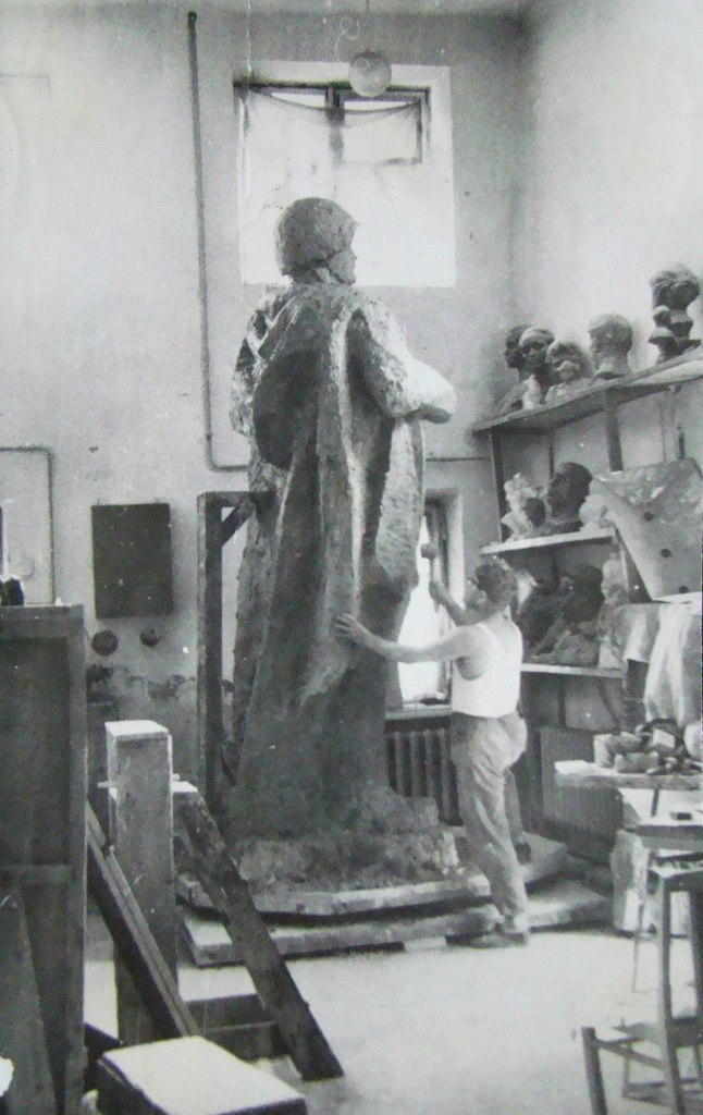 Петр Петрович Карякин за работй в скульптурной мастерской